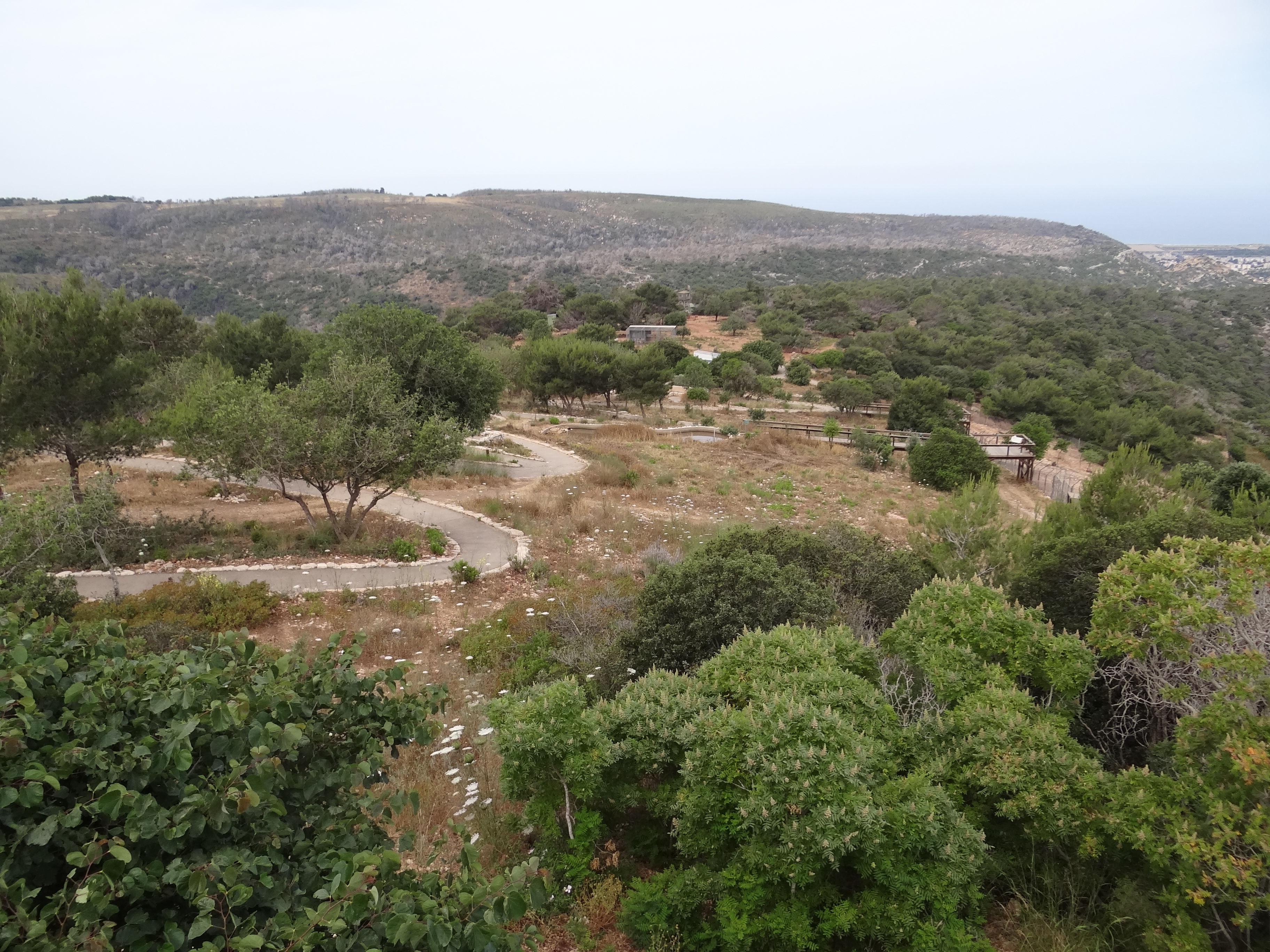 Category:Carmel Hai-Bar Nature Reserve, Animal Nature Reserve. Mount Carmel Israel חי-בר כרמל משמש כמקום רבייה לבעלי חיים שחיו בכרמל ונעלמו. ביניהם, אייל הכרמל, יחמור פרסי, נשר, עיטם זנב לבן, צבי ארצישראלי, עז בר וכבש בר